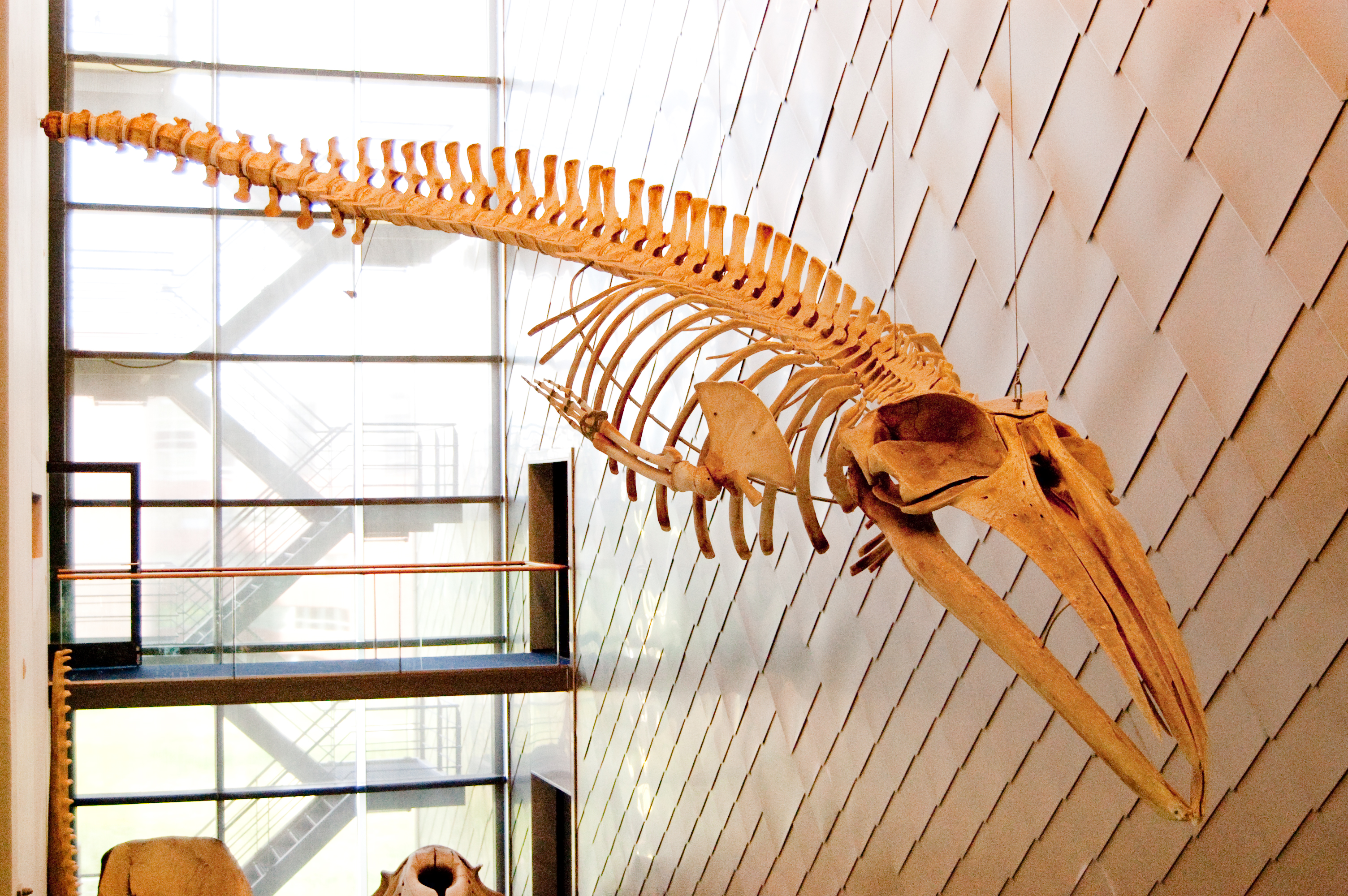 Noordse vinvis 04029 skelet van een Noordse vinvis op de vide van Naturalis